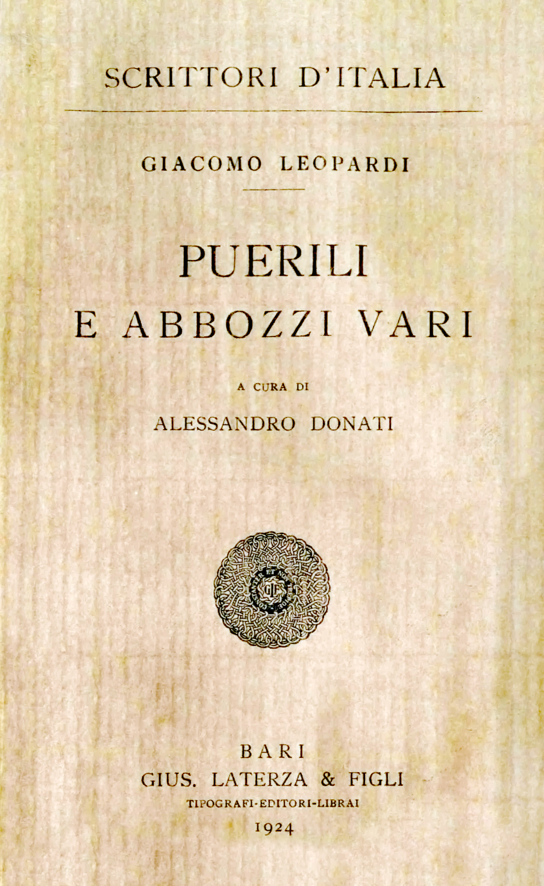 10: Puerili e abbozzi vari / Giacomo Leopardi ; a cura di Alessandro Donati. - Bari : G. Laterza & f.i, 1924. - 294 p. ; 23 cm. - (Scrittori d'Italia ; 91) .